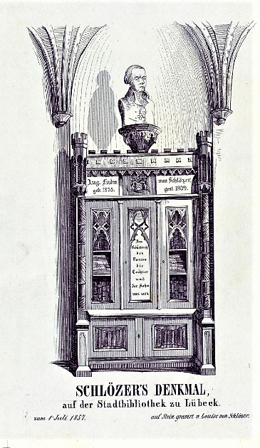 Luise von Schlözer: Schlözers Denkmal auf der Stadtbibliothek zu Lübeck, Lithographie zum 1. Juli 1857, Schlözer-Stiftung Bilder D 133a, Niedersächsische Staats- und Universitätsbibliothek Göttingen